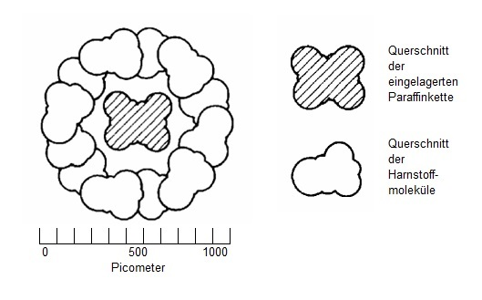 Harnstoff-Paraffin-Addukt nach F. Klages: Aufbau und Eigenschaften der Materie im Mikro- und Makrokosmos, S. 90